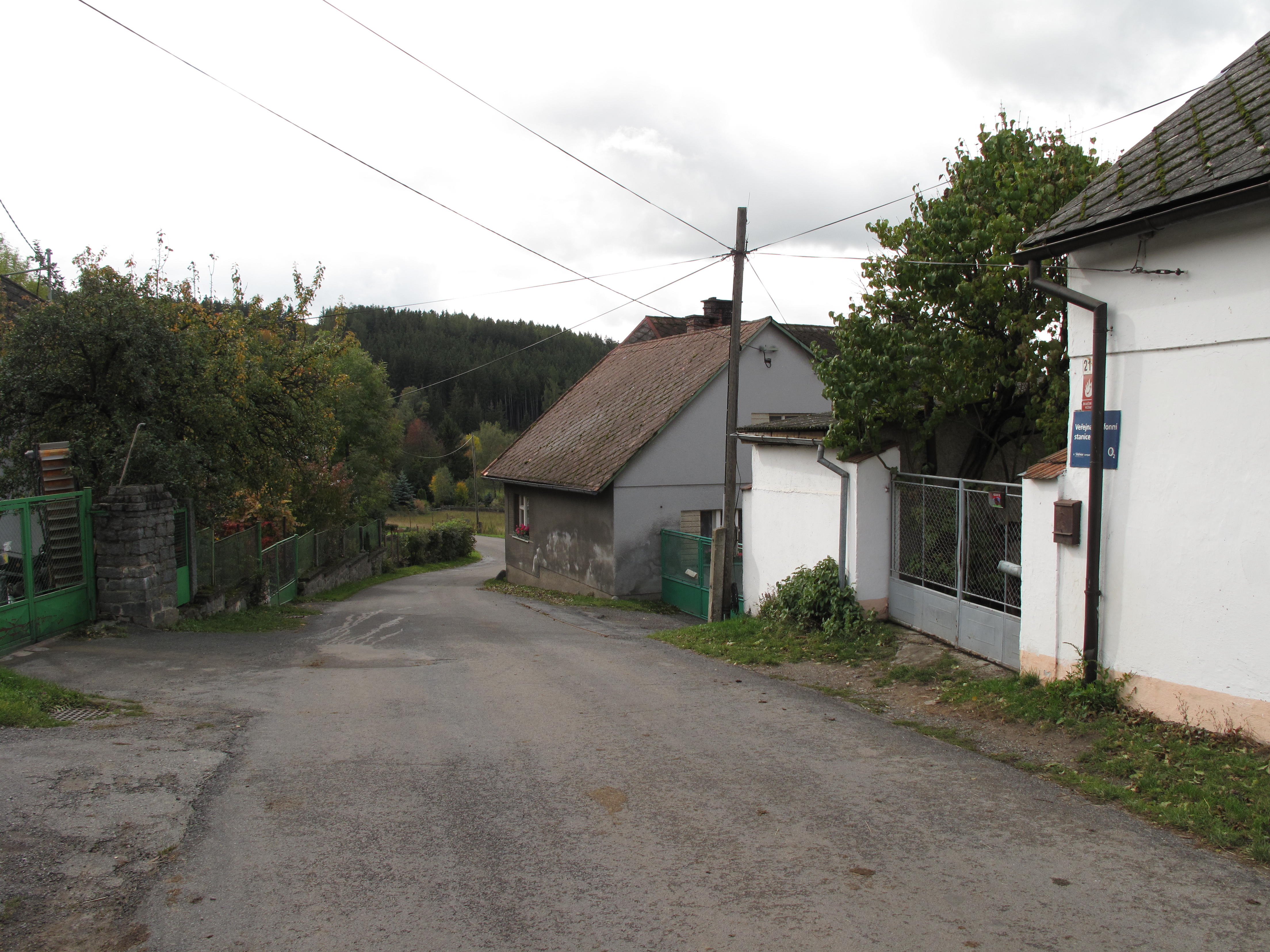 Odolenov. Okres Klatovy, Česká republika.